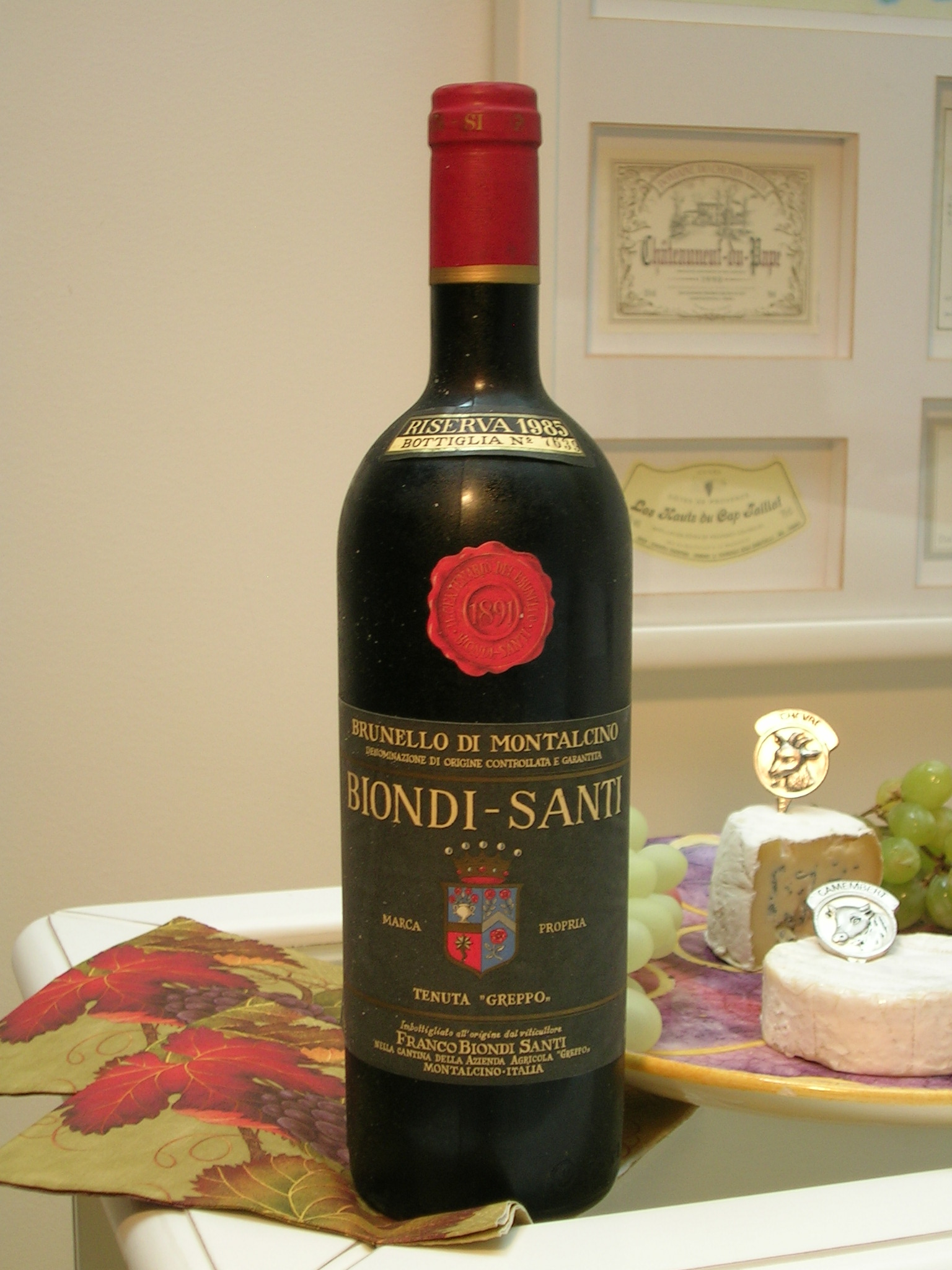 Garrafa de vinho Brunello di Montalcino de Biondi Santi - 1985